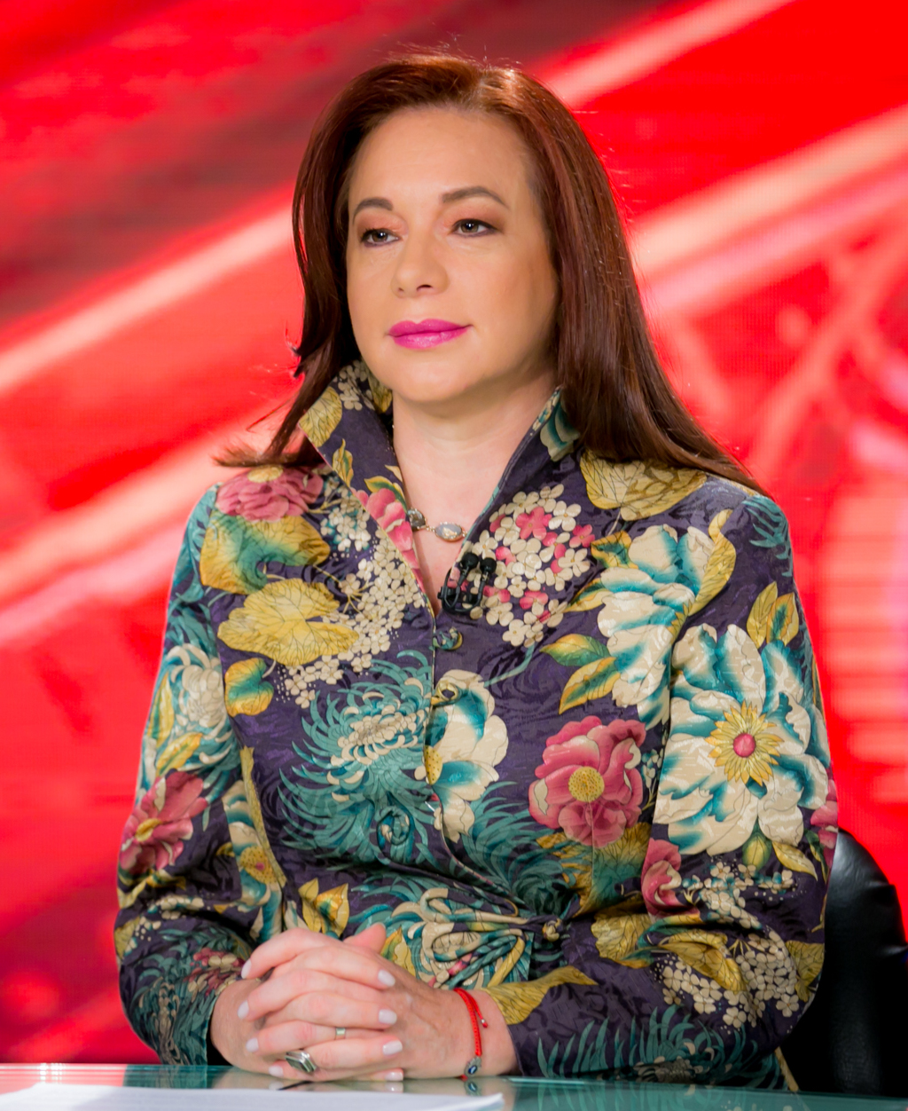 Entrevista de Canciller María Fernanda Espinosa en Ecuavisa